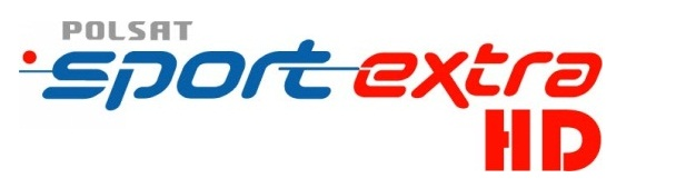 Polsat Sport Extra HD logo